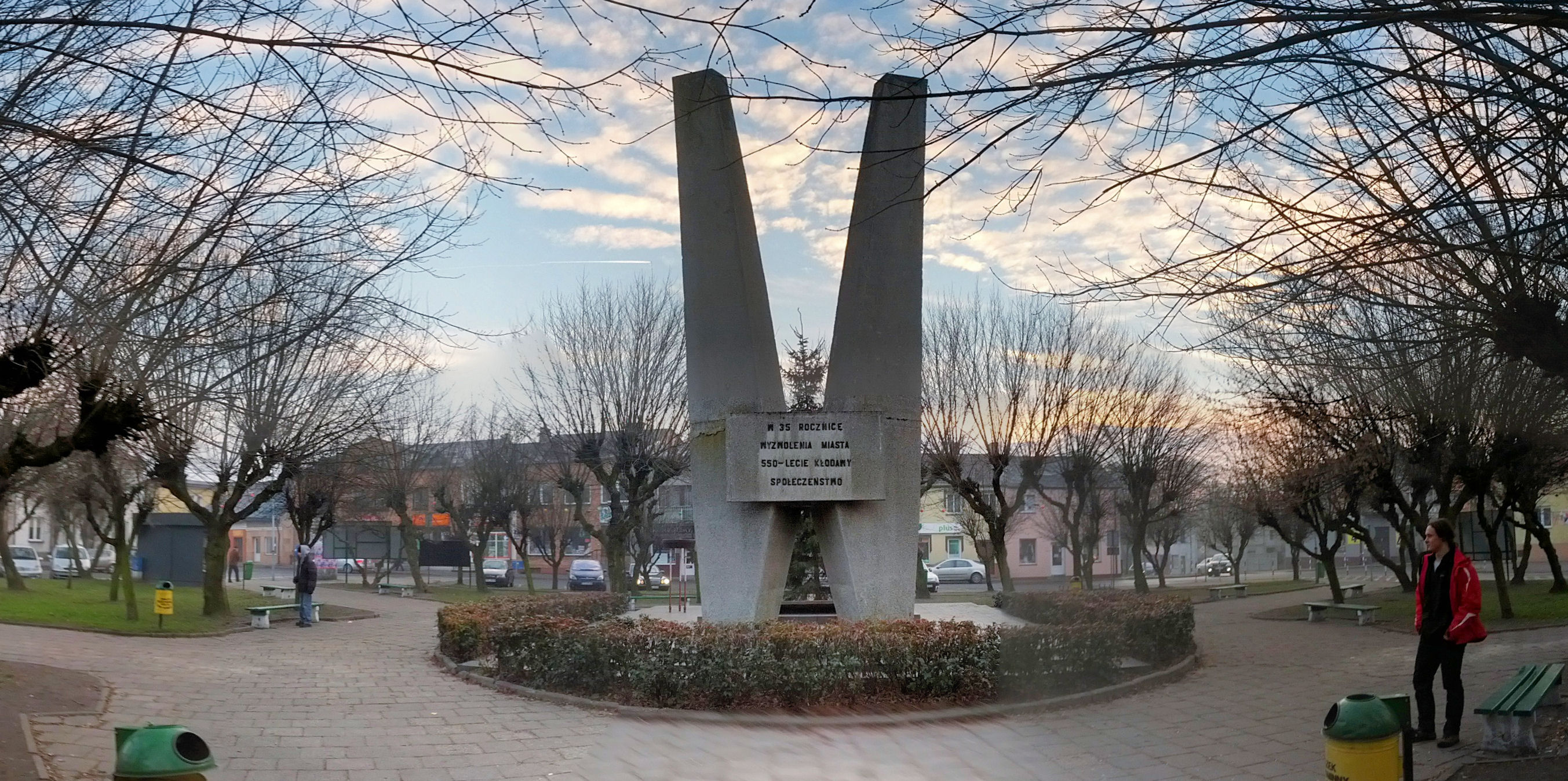 panorama rynku z Pomnikiem Poległych, Kłodawa, miasto w woj. wielkopolskim, w powiecie kolskim,Polska